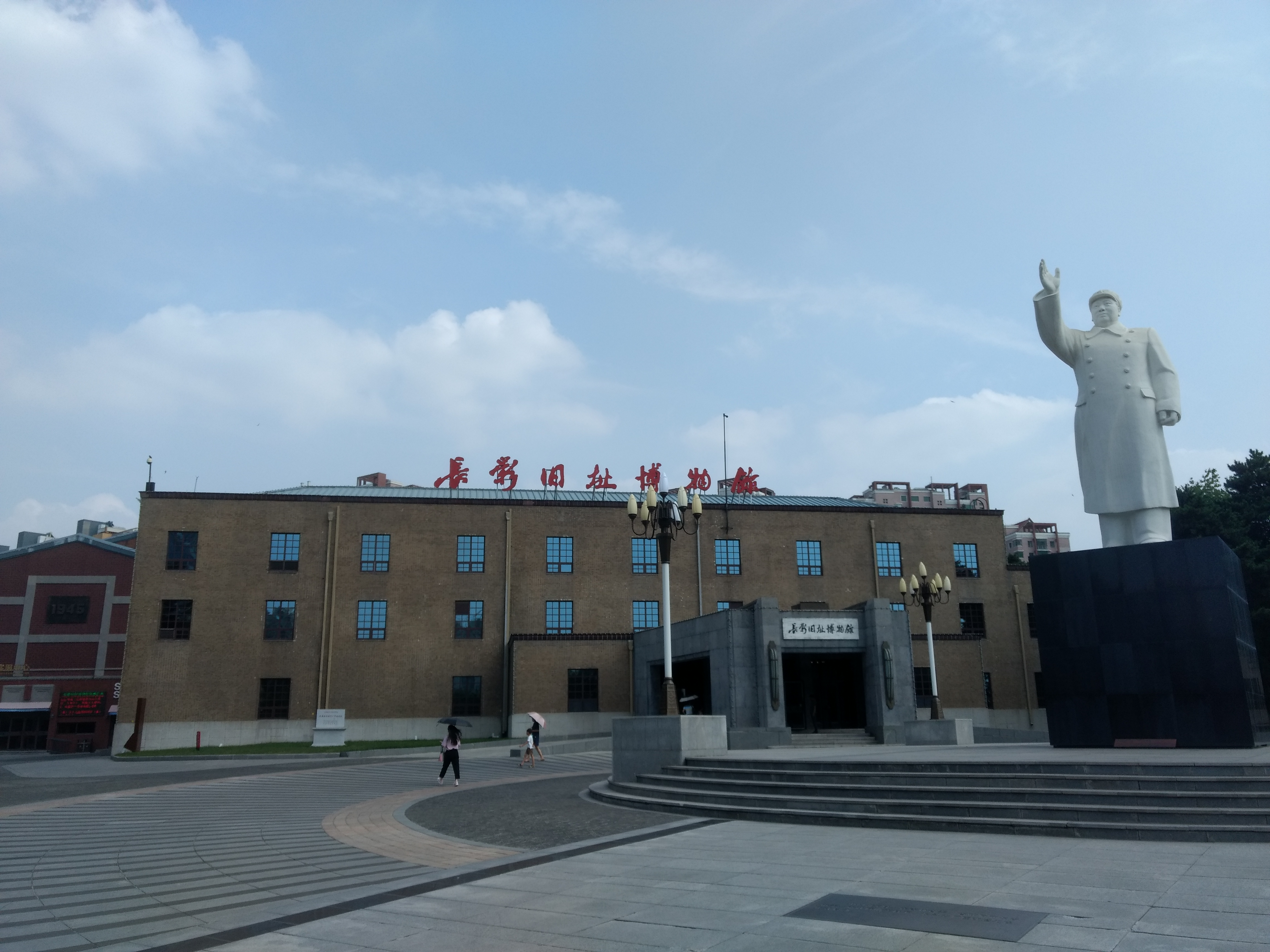 Entrada a l'antic estudi de cinema de Changchun.